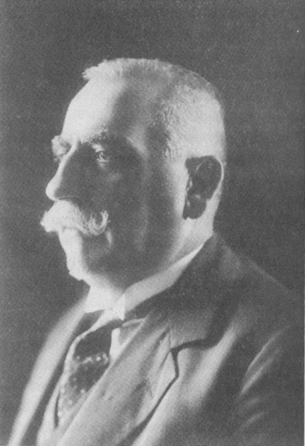 Андрей Ляпчев (1866-1933)